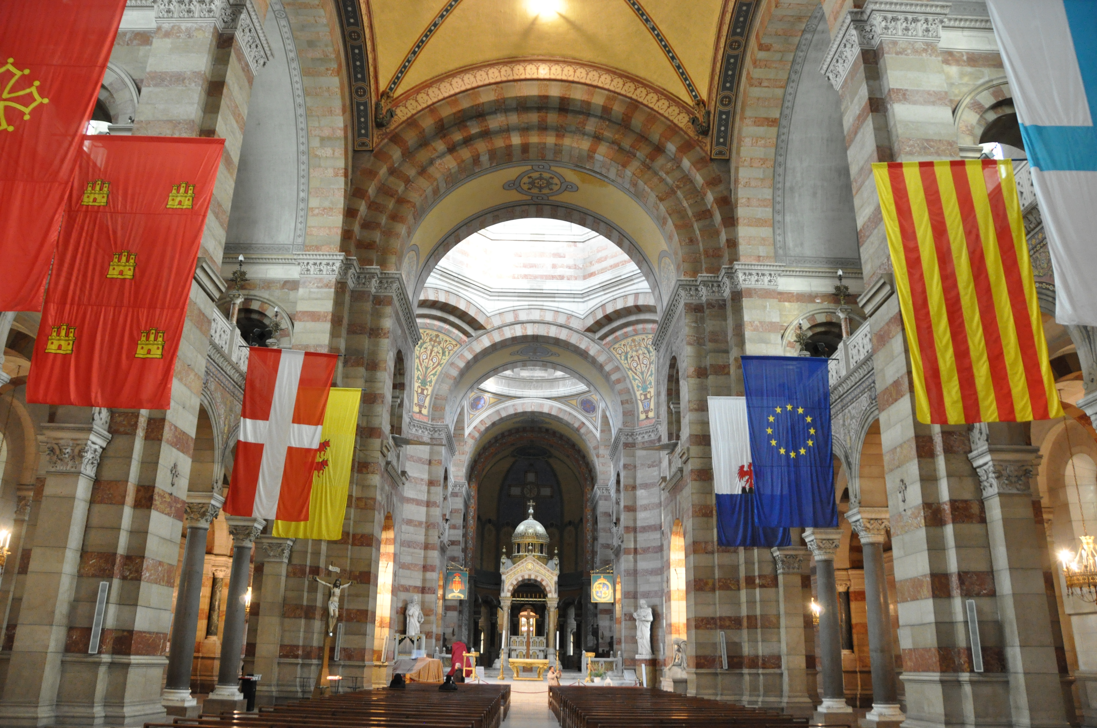 Marseille - Cathédrale La Major Interieur Ancien drapeau de Provence